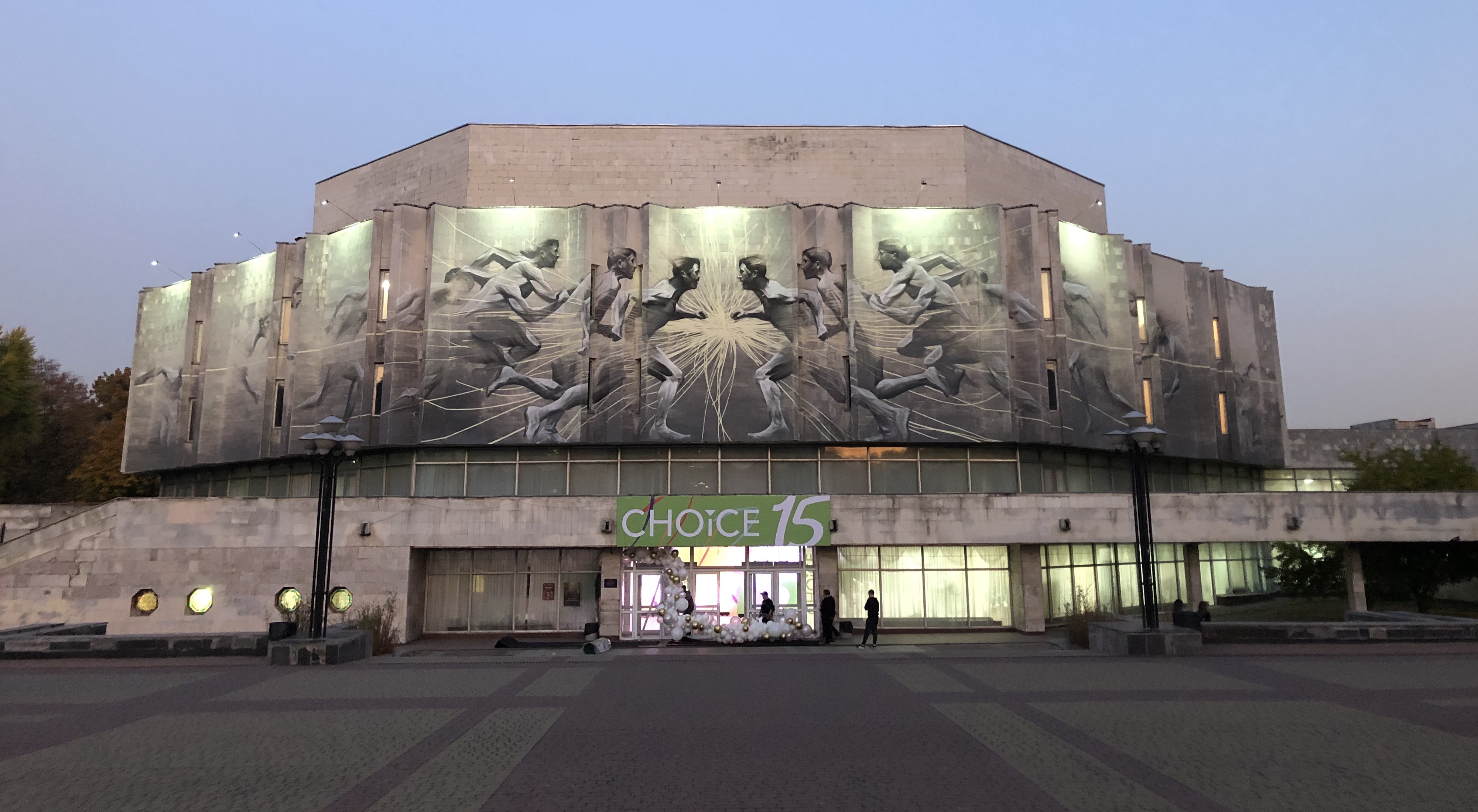 Мурал канадського художника Аарона Лі-Хілла. Створений нафасаді Центру культури та мистецтв НТУУ "КПІ" в рамках програми міжнародного фестивалю сучасного мистецтва у громадському просторі Mural Social Club, організатором якого виступив благодійний фонд Sky Art Foundation. Куратори проекту – Олег Соснов та Юлія Островська.